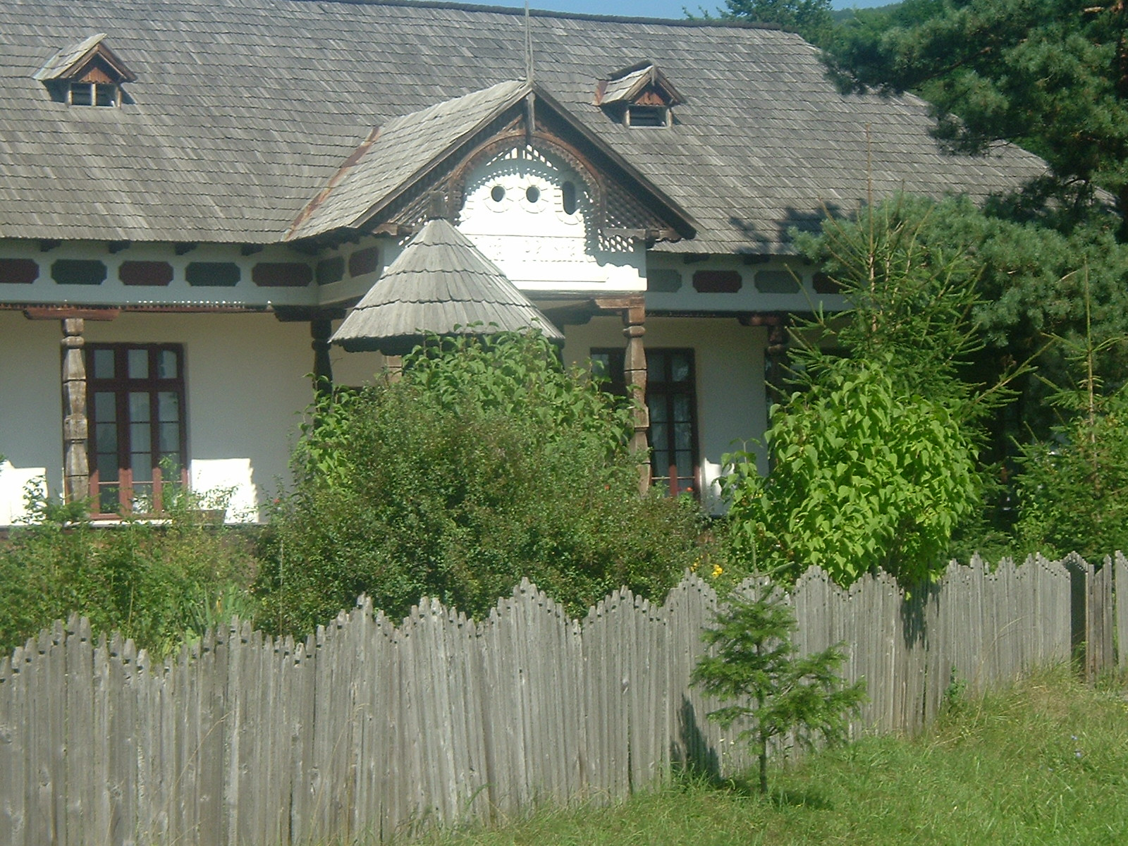 Dorfmuseum Satului Vâlcean. Landschule